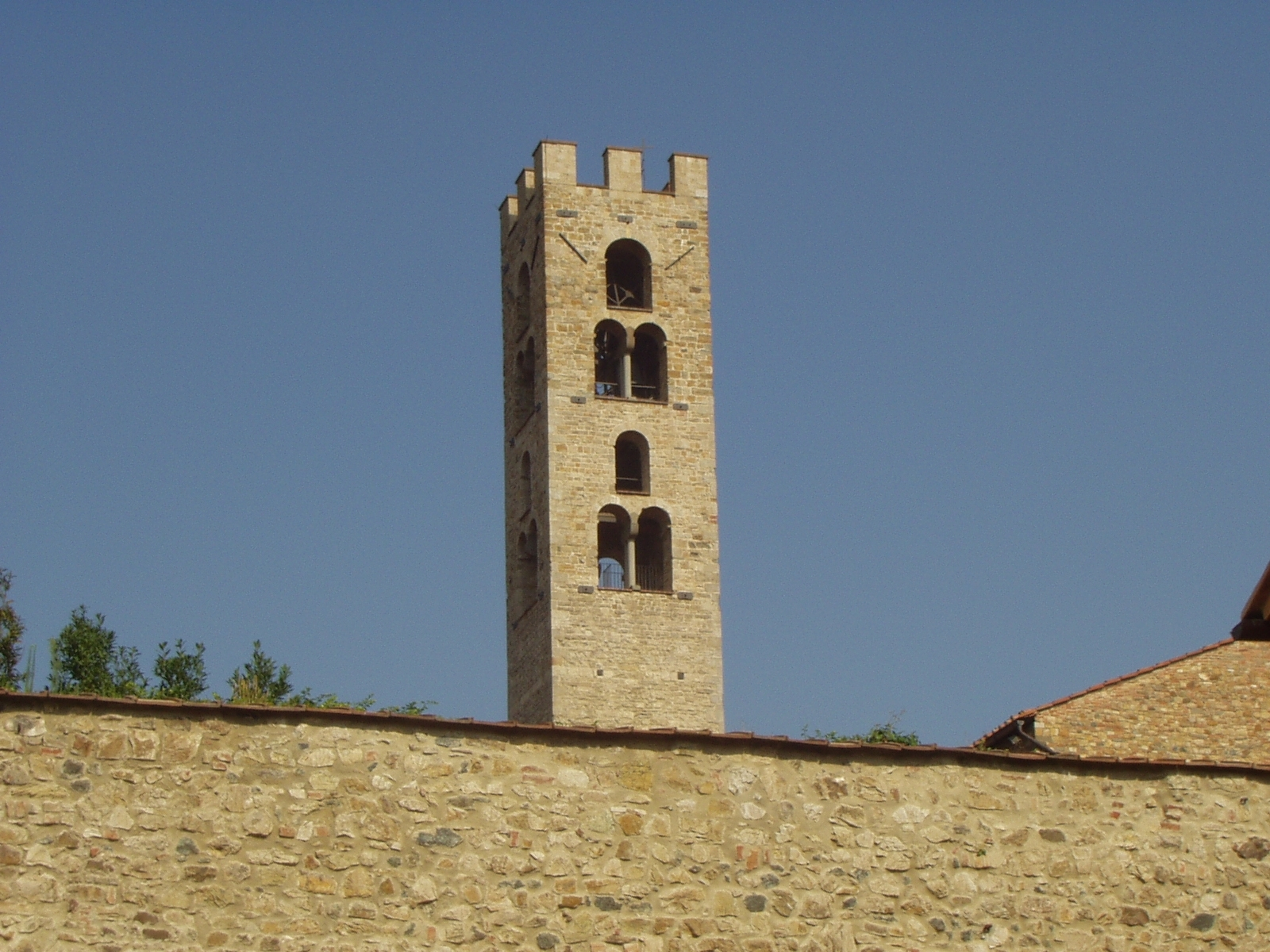 Campanilla in Impruneta